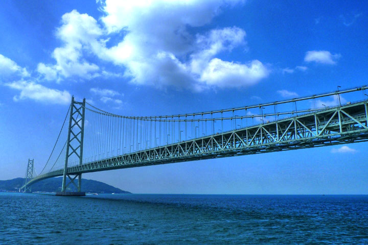 Akashi-Kaikyo Bridge：明石海峡大橋